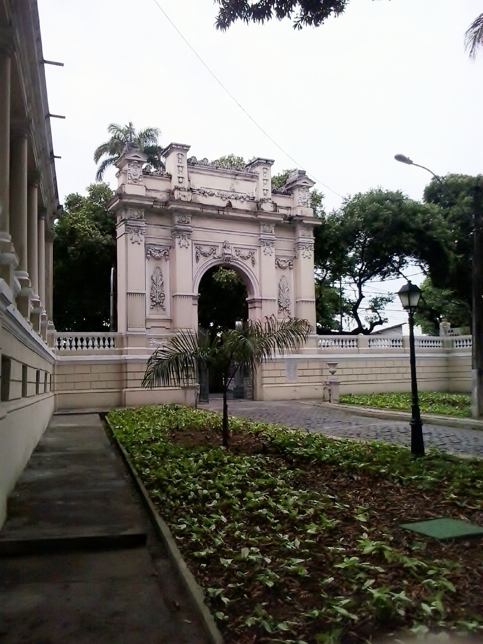 Vista do portal de entrada do Passeio Público saindo deste, em Salvador, Bahia, Brasil.